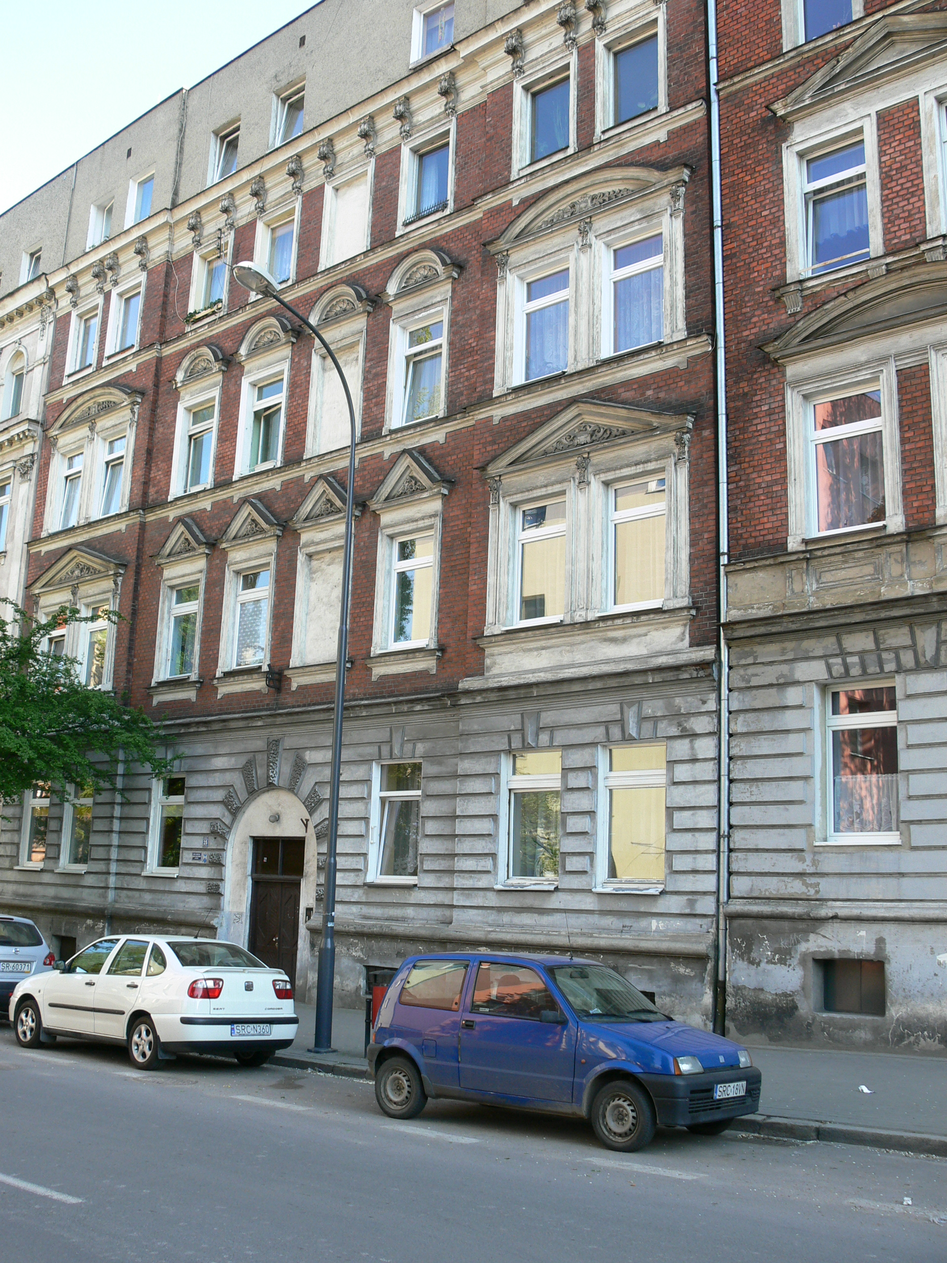 Racibórz - kamienica przy ul. Staszica 25